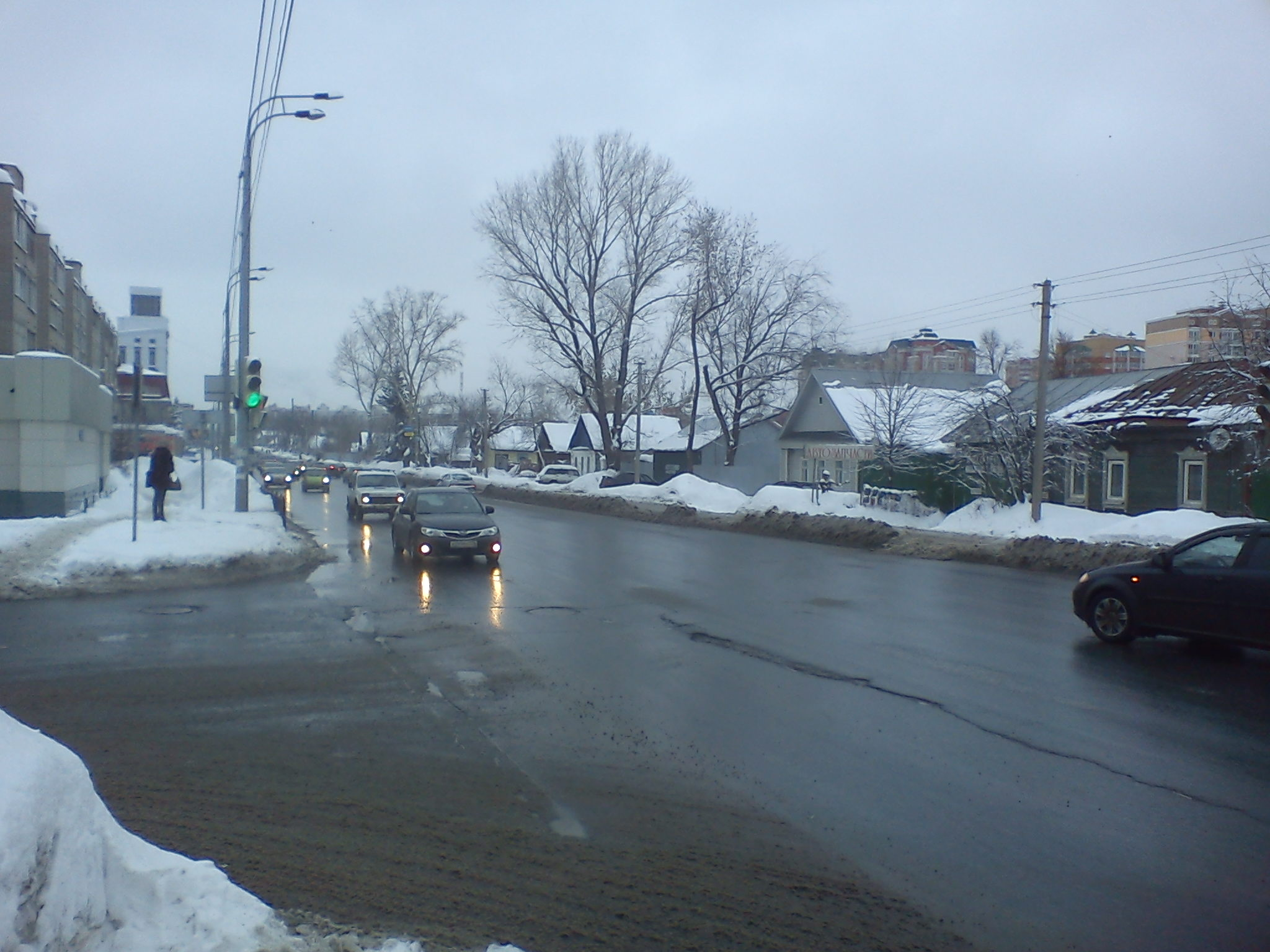 Частный сектор на улице Кутуя